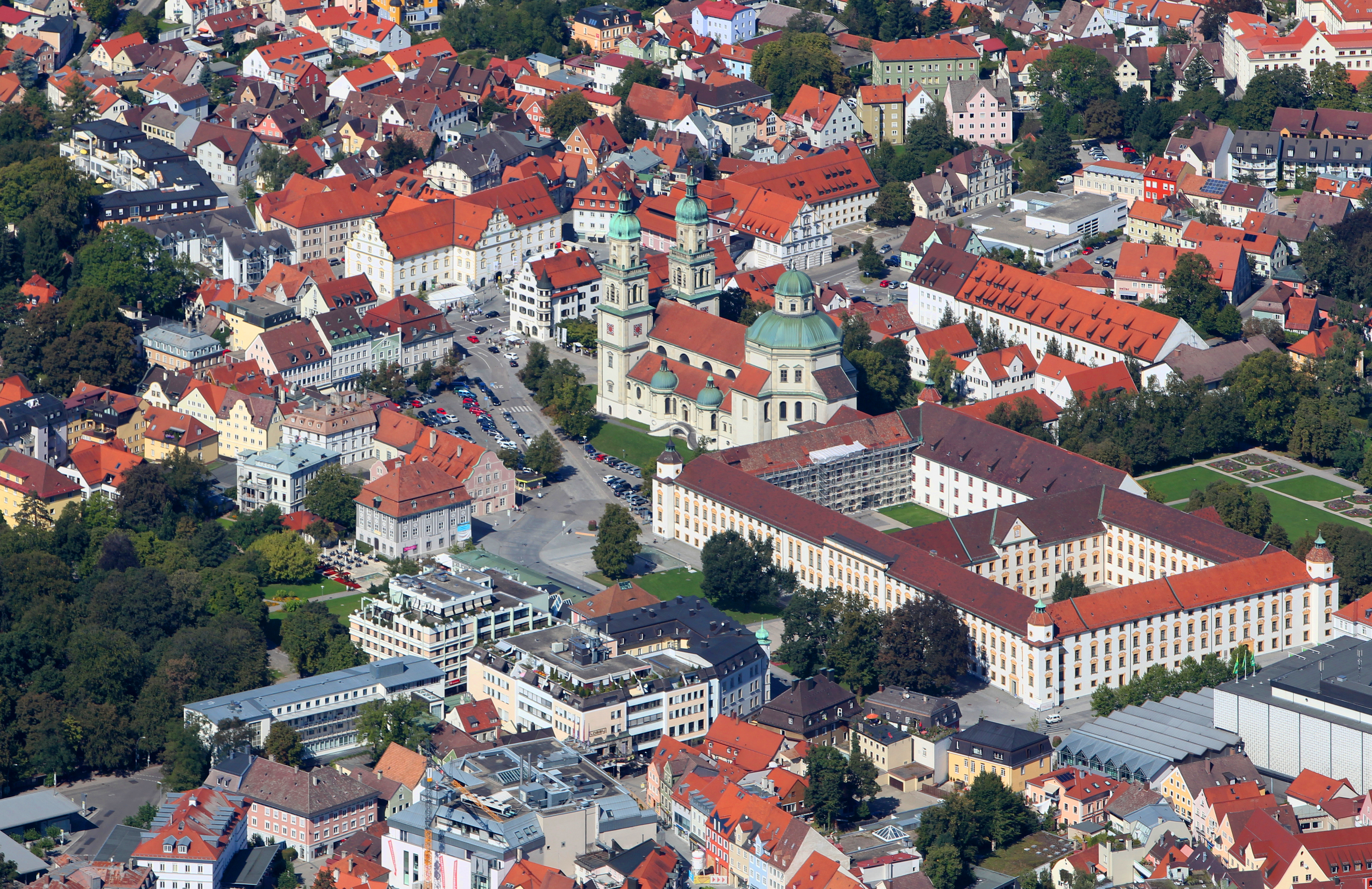 Fürstäbtliche Residenz und Basilika St. Lorenz in Kempten (Allgäu)